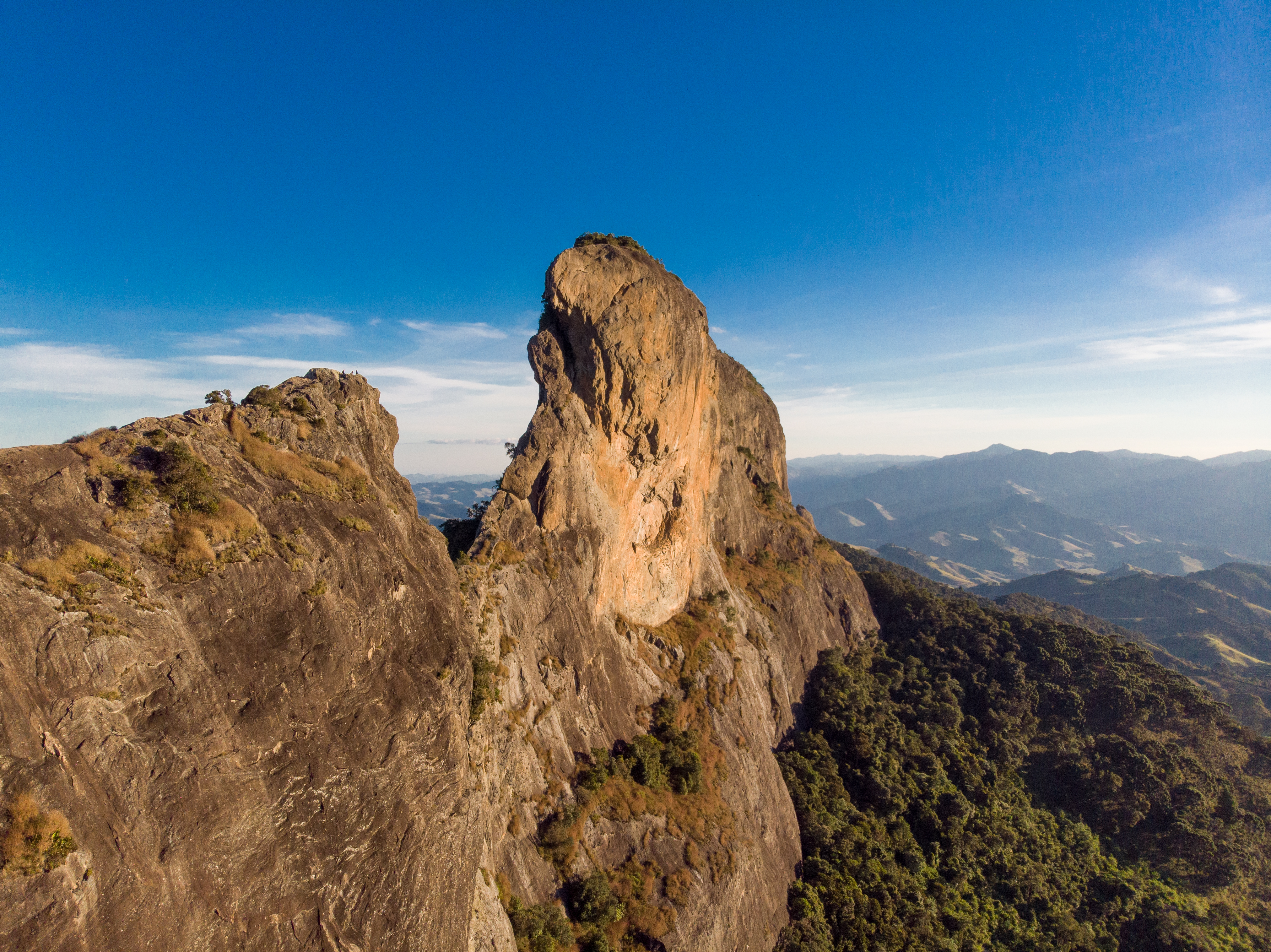 Imagens com drone para o vídeos do festival. Data:11/06/2019. Local: São Paulo Foto: Governo do Estado de São Paulo